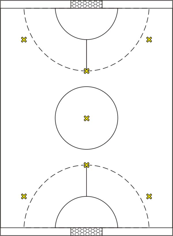 Skizze eines Radball-Spielfeldes